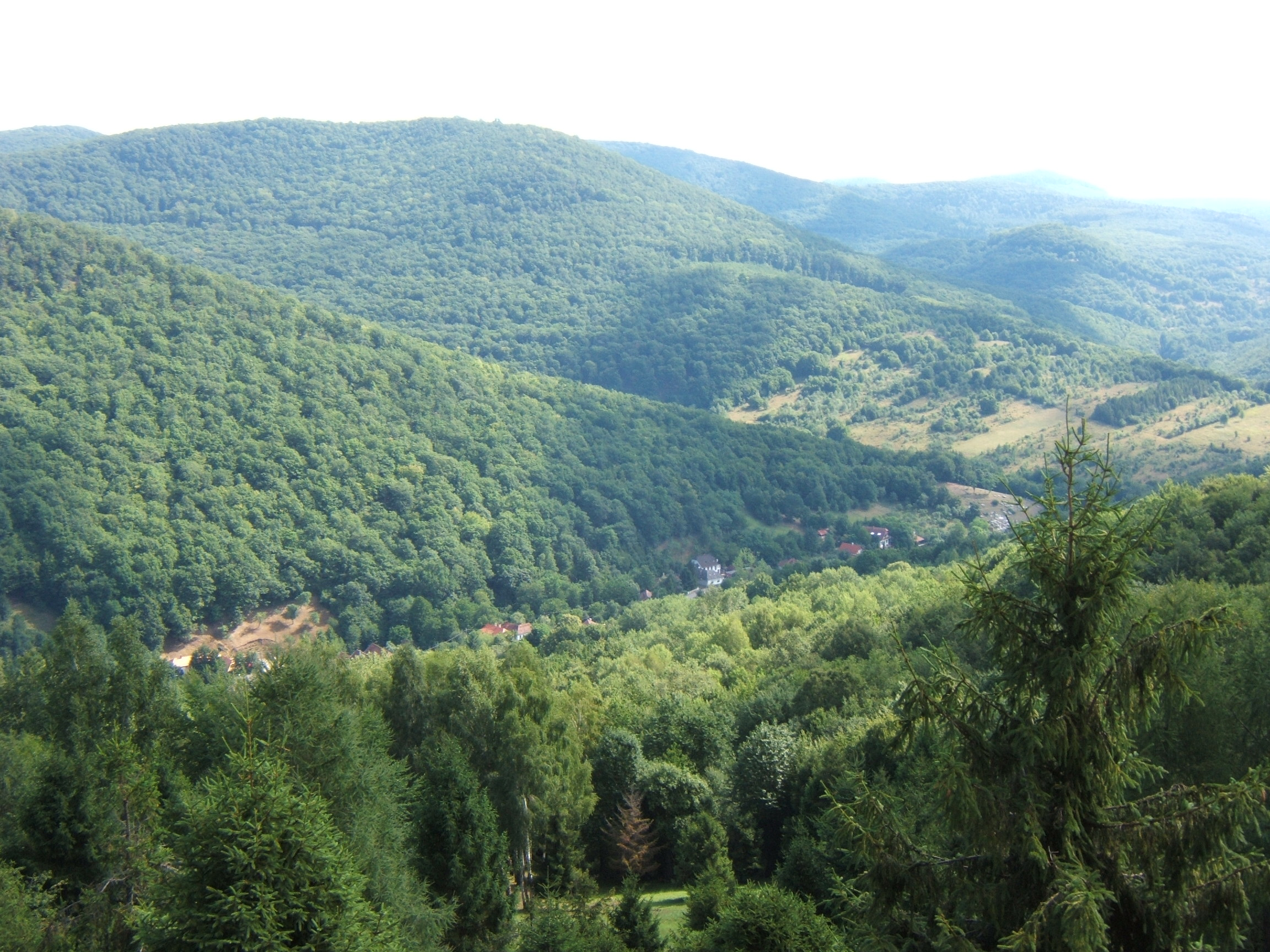 Háromhuta, Óhuta látképe